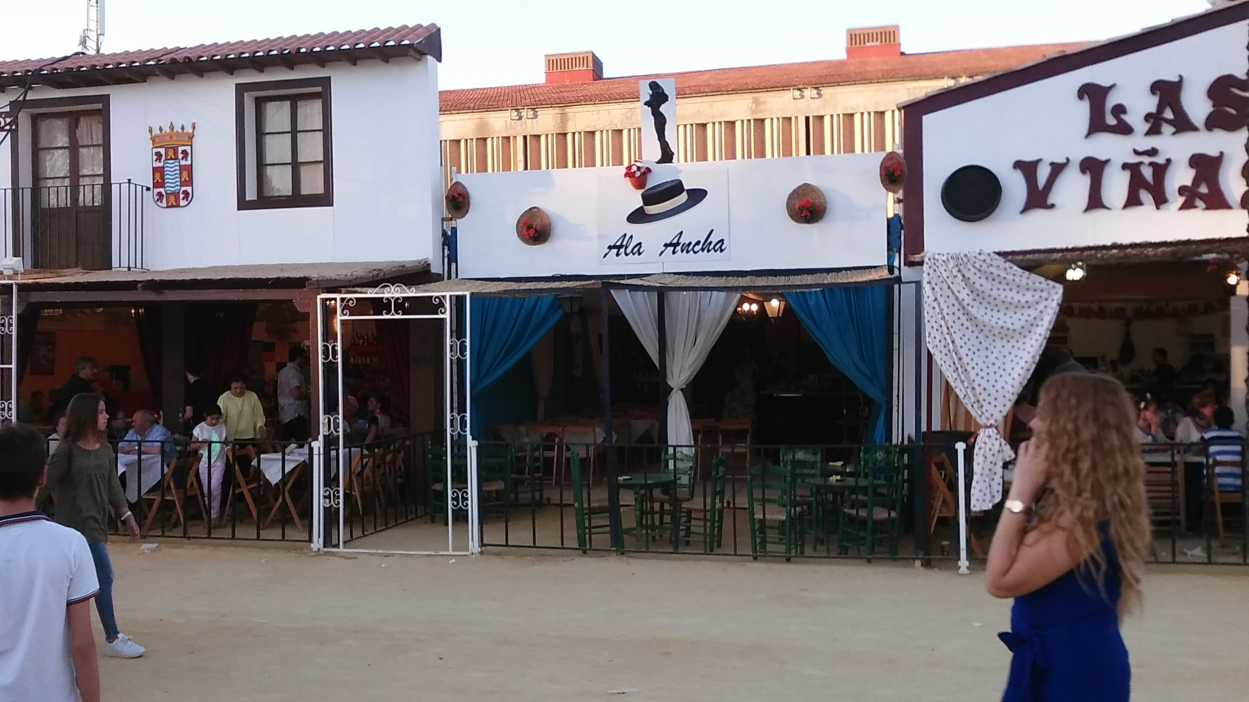 Caseta de la Asociación Ala Ancha. Feria del Caballo 2017